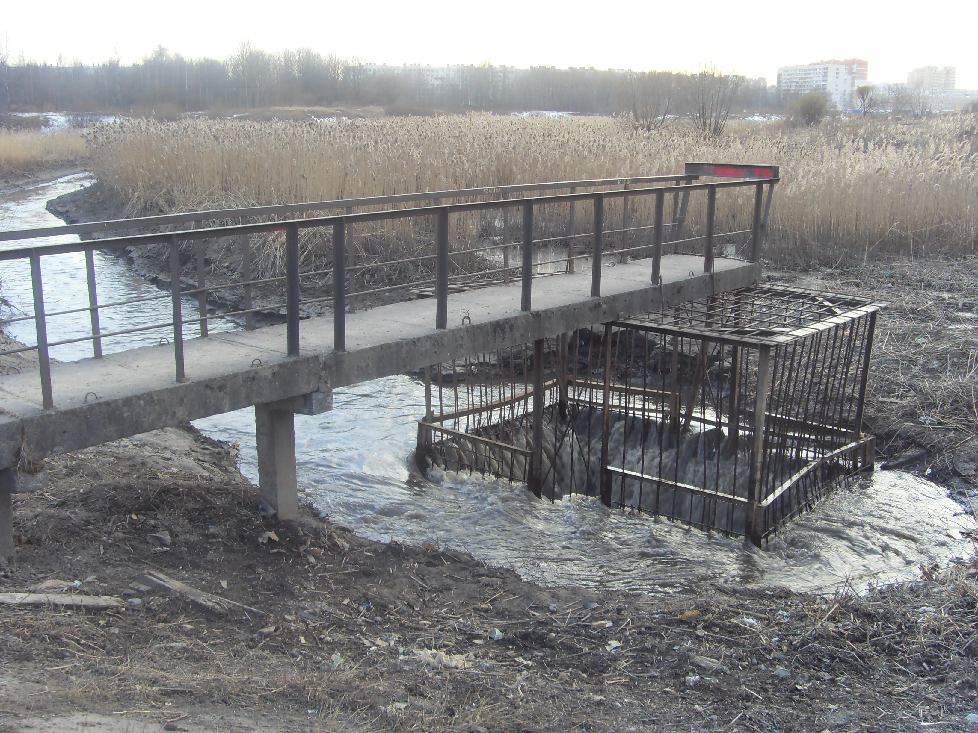 Муринский ручей в районе улицы Руставели (Санкт-Петербург) Экологическая катастрофа.